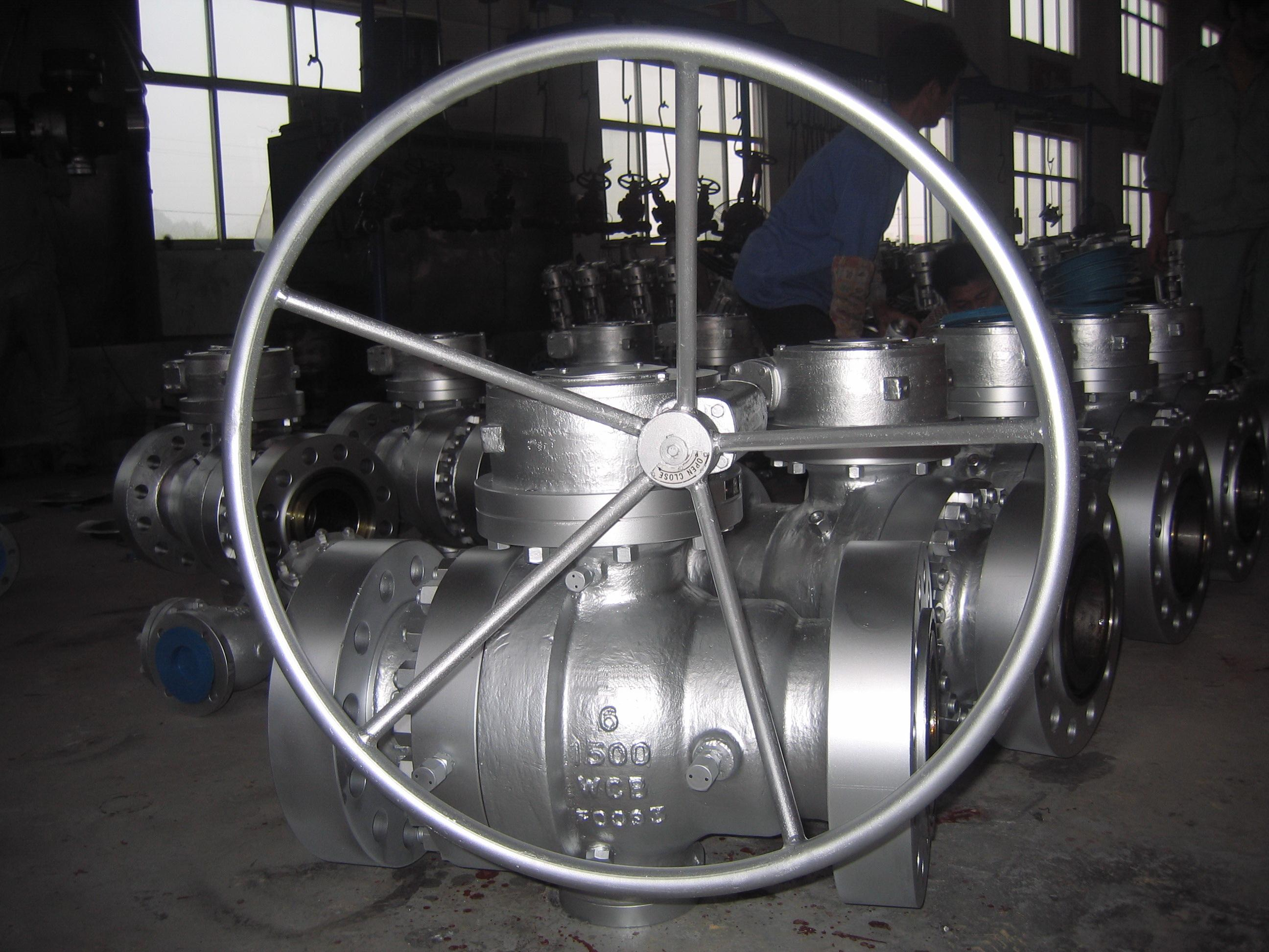 Ball valve.